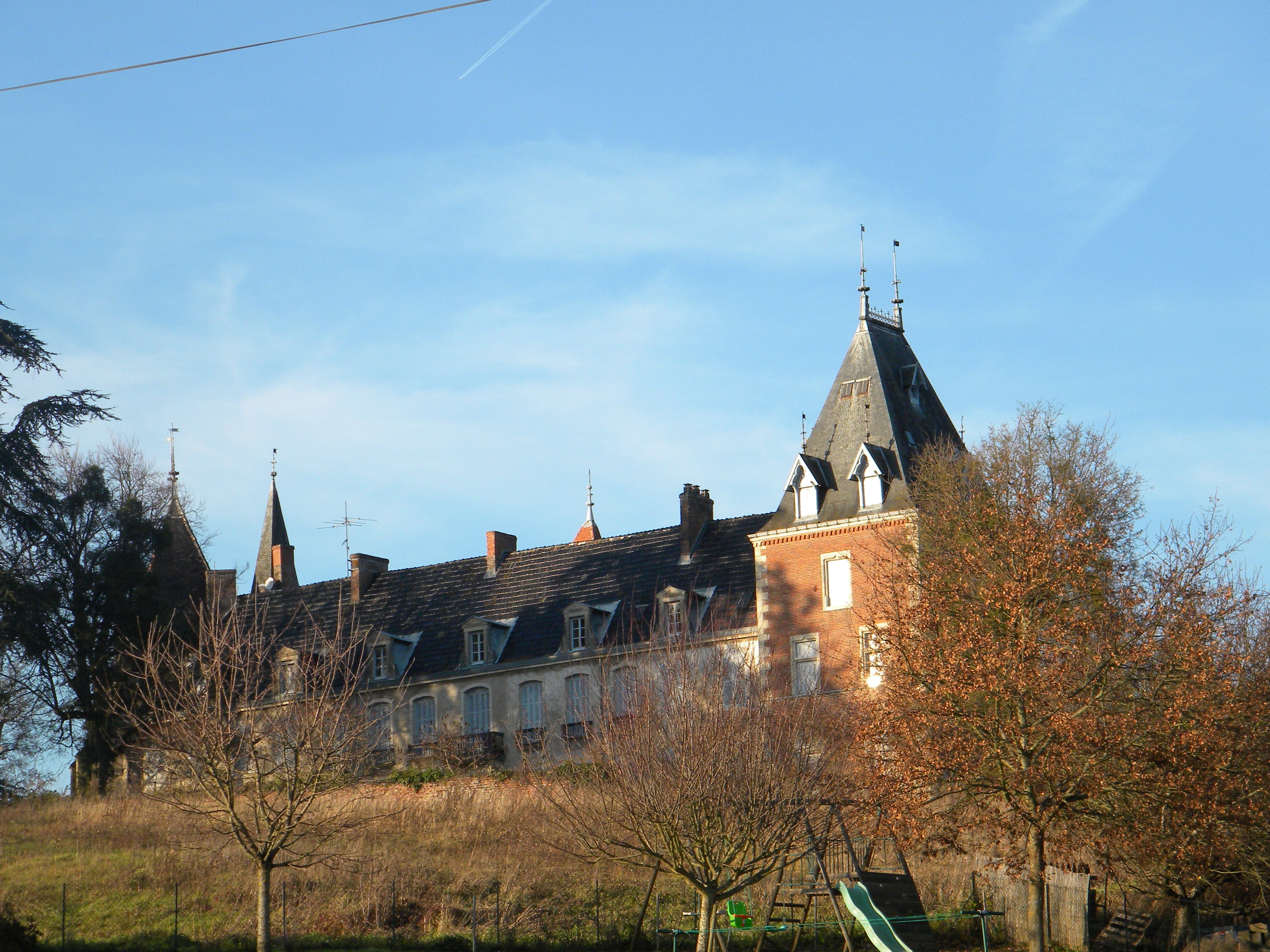 Kastelo de Auvillars-sur-Saône